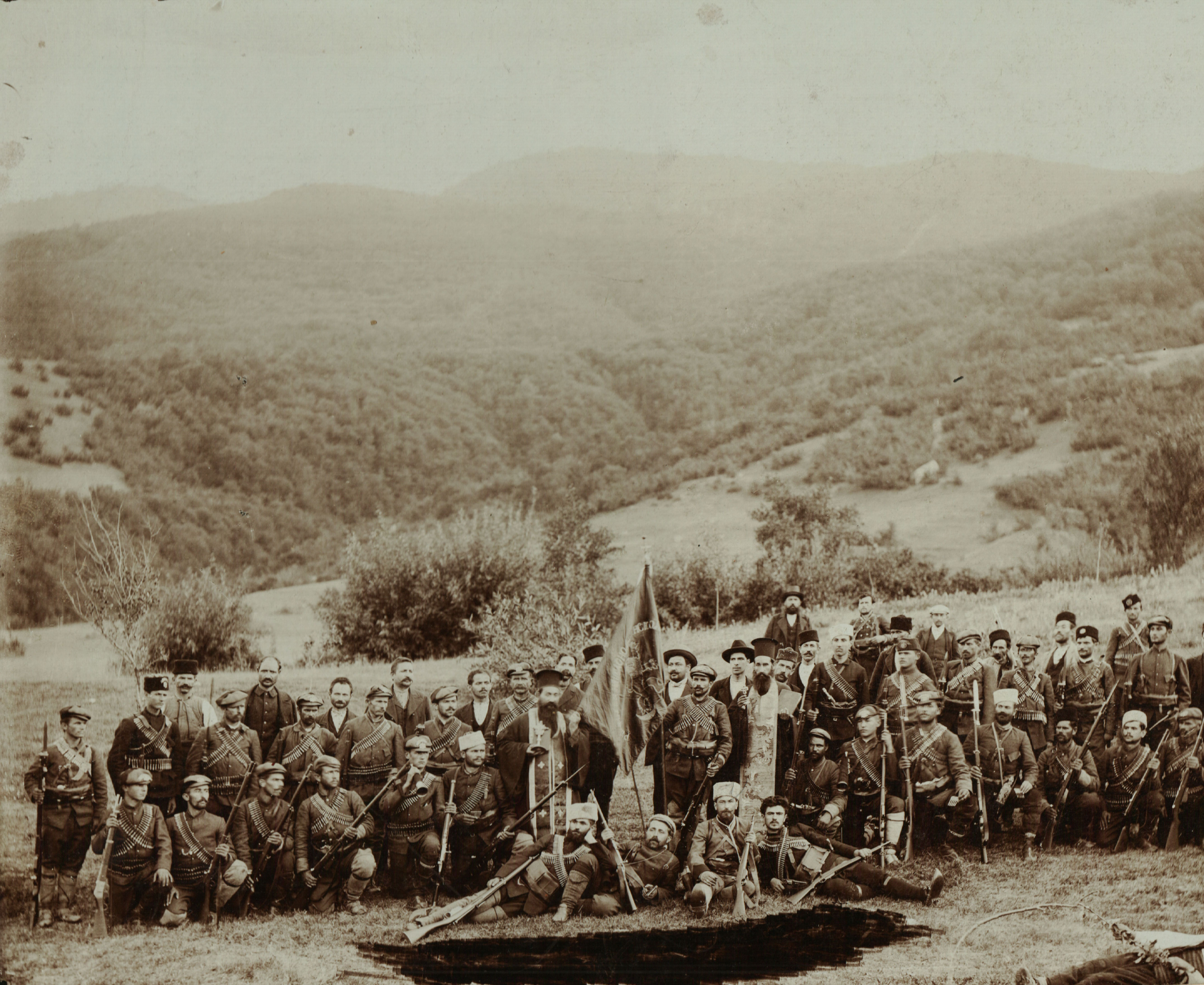 Снимка на четата на Стефан Николов